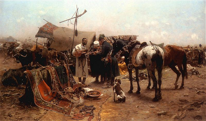 Jarmark w Bałcie.